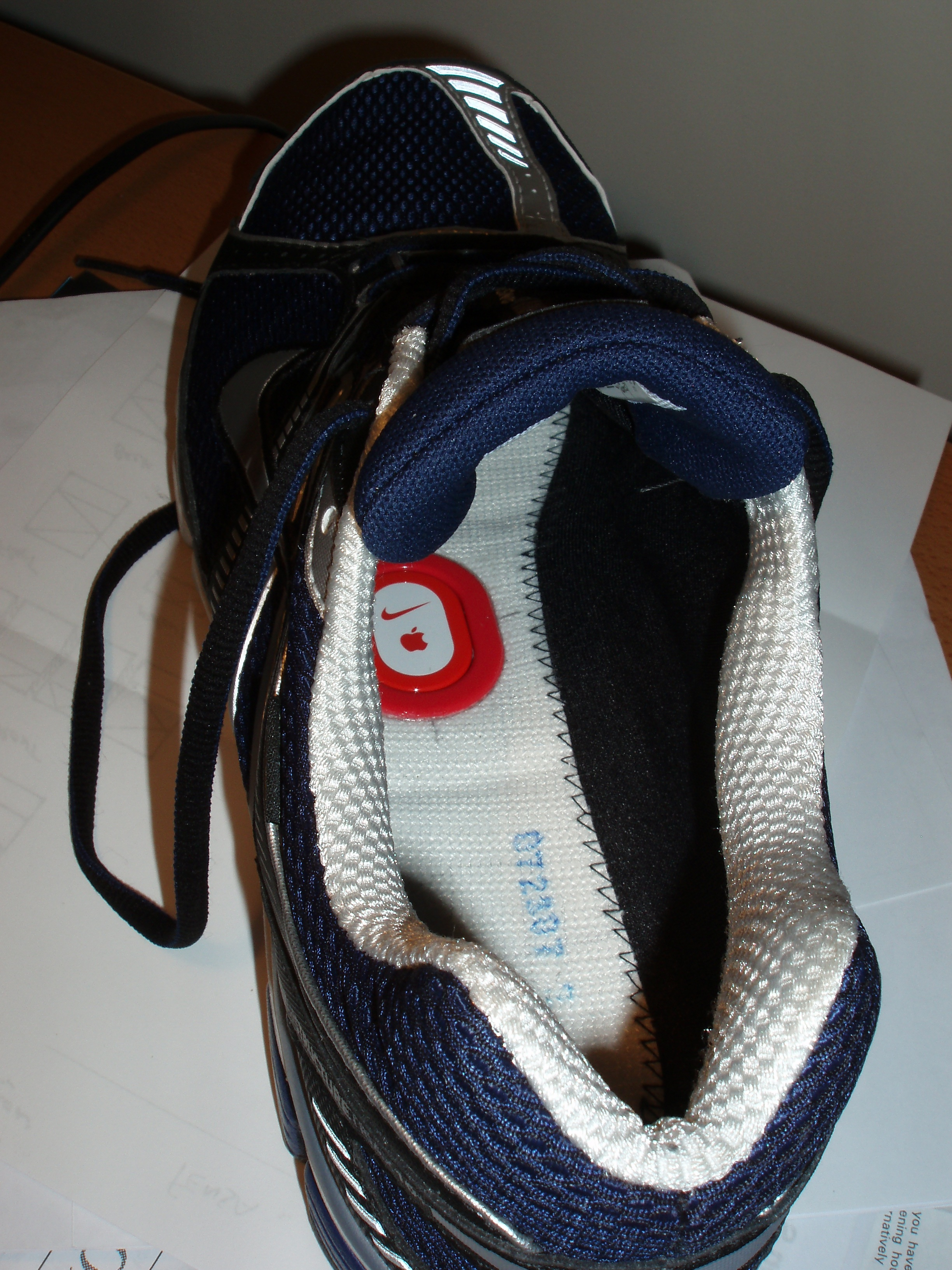 Nike + iPod Transmitter in Nike Training shoe